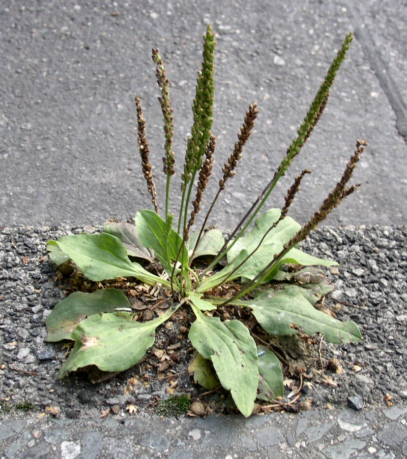 Beschreibung: Breitwegerich (Plantago major) Lizenzstatus: GNU FDL